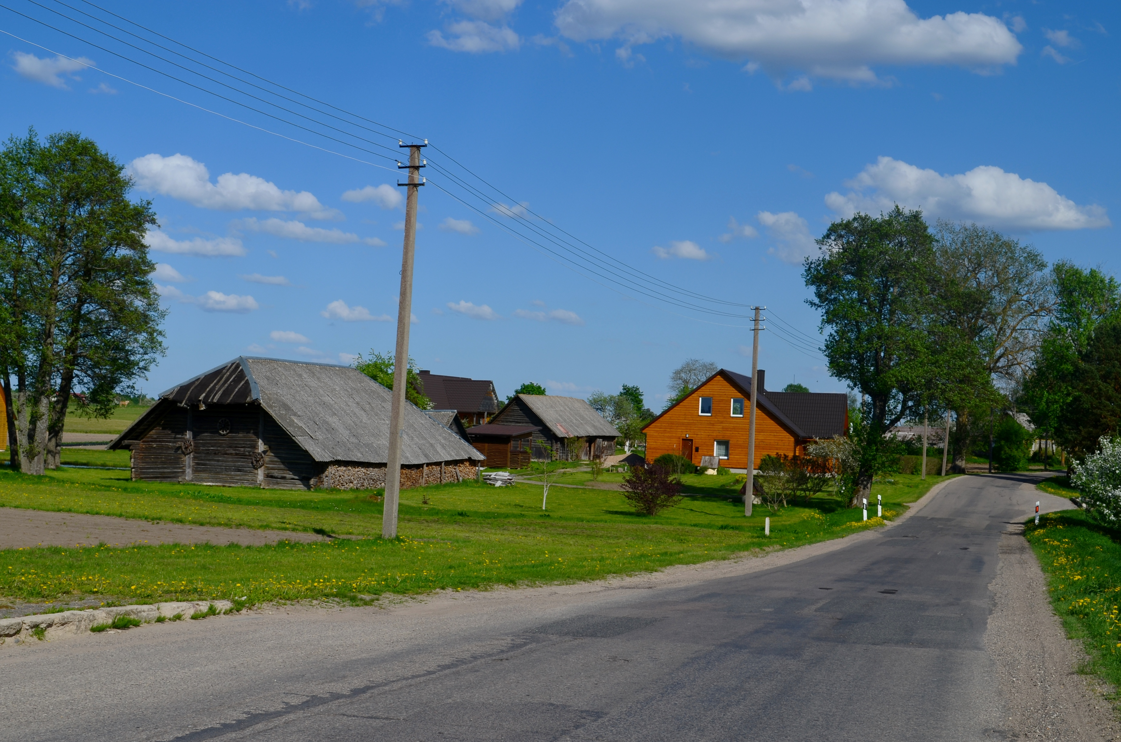 Arnionys II, Joniškio sen., Molėtų raj.